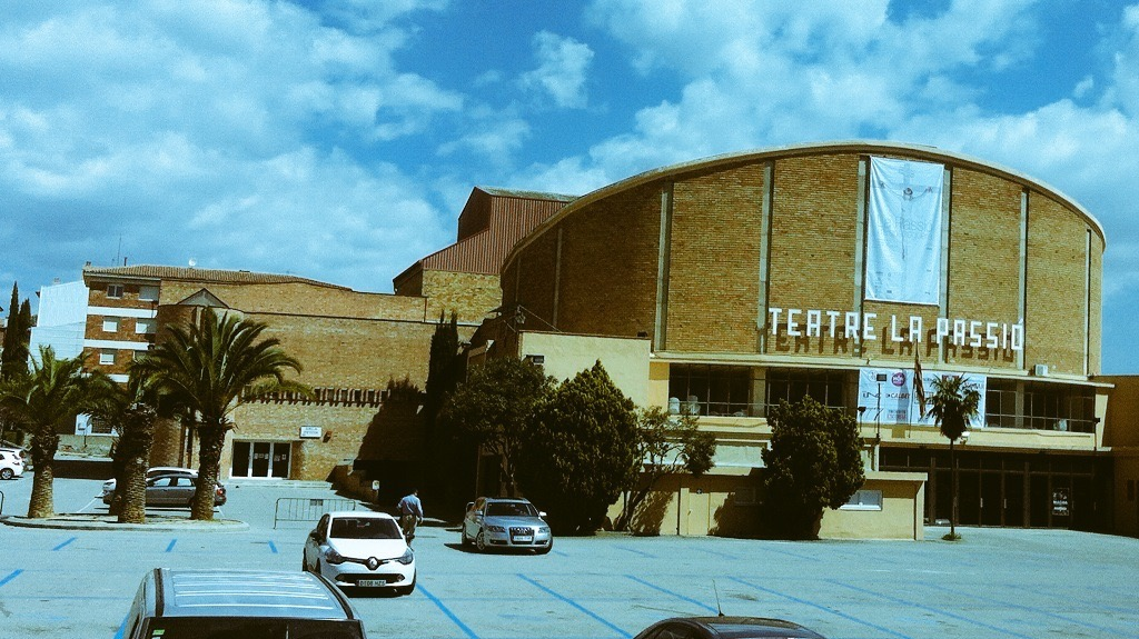 Teatre la Passió d'Esparreguera